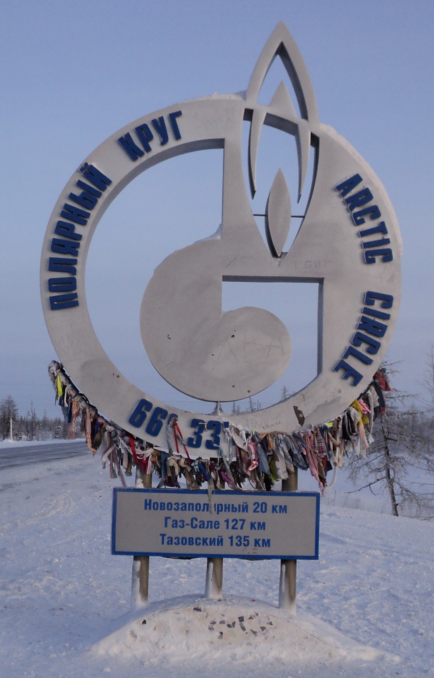 Россия, ЯНАО, Полярный круг.